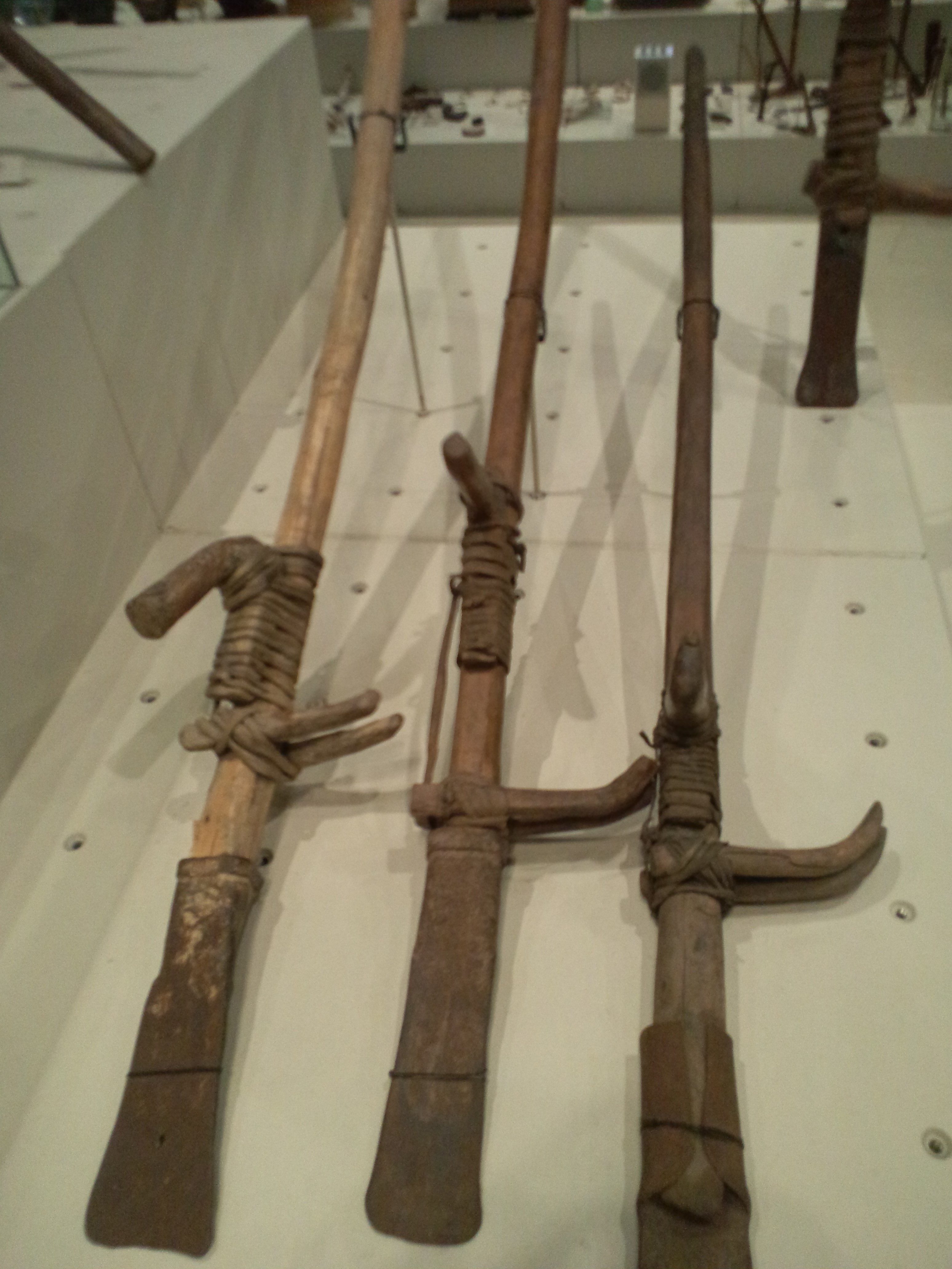 リトルワールド 本館展示室 踏みすき（ケチュア族、ペルー）